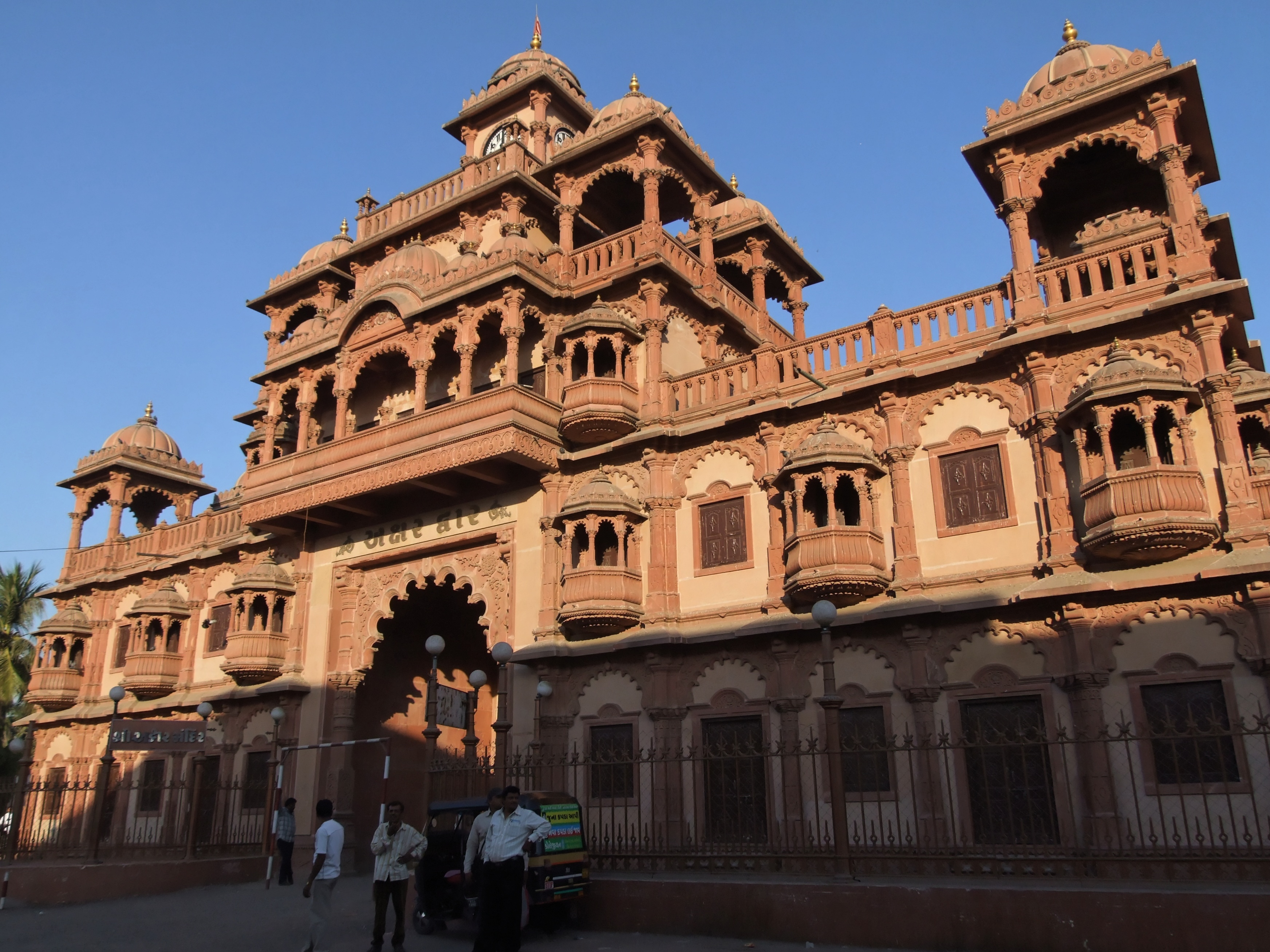 Goandal - Swaminarayan Temple, Gujarat - India Gondal - Swaminarayan Temple, Gujarat